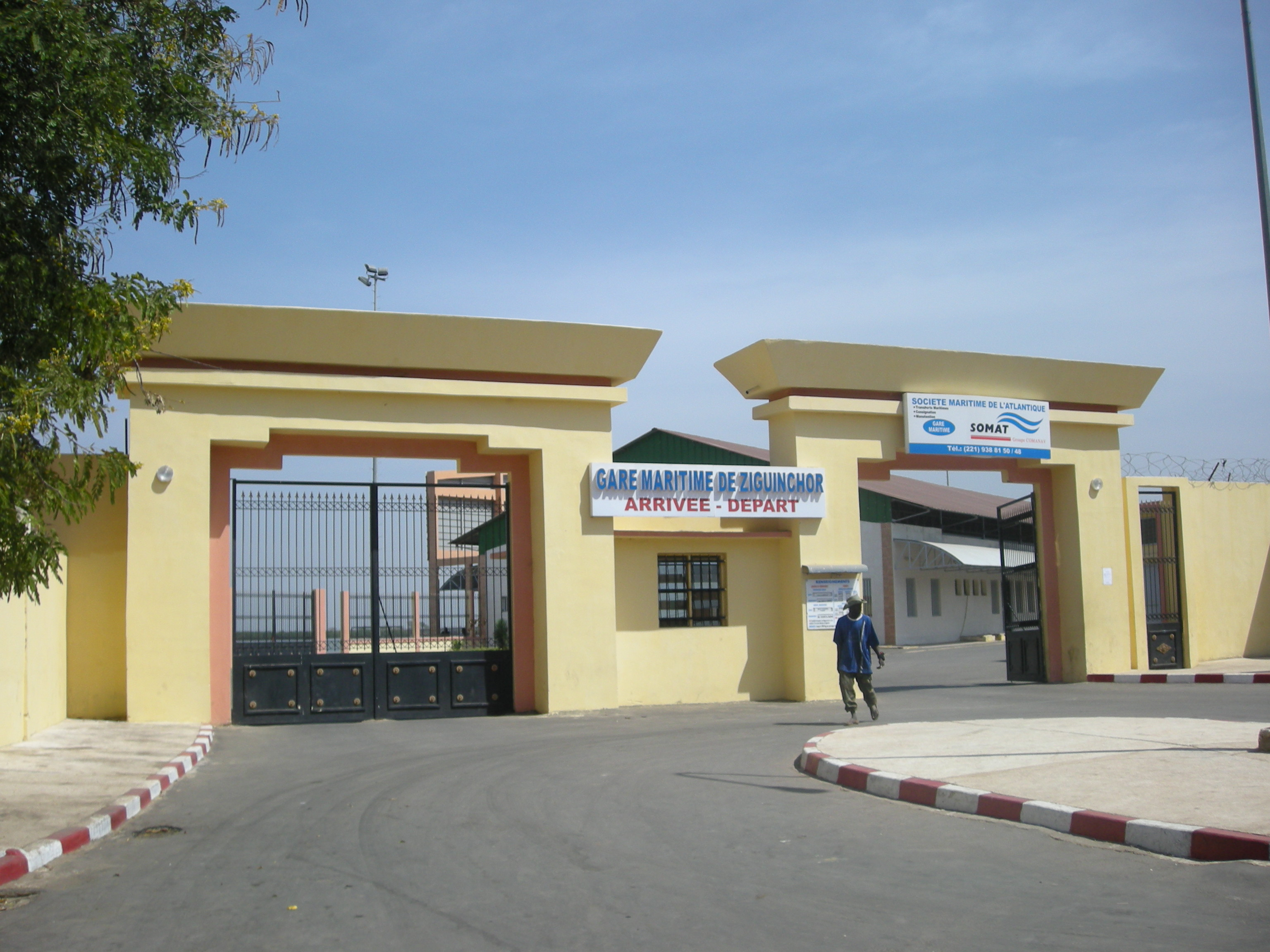 La gare maritime de Ziguinchor (Casamance, Sénégal)